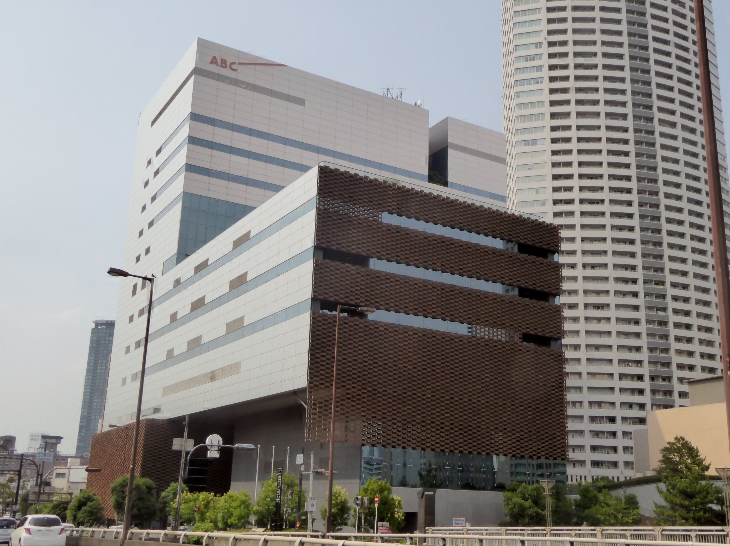 朝日放送株式会社本社を撮影。